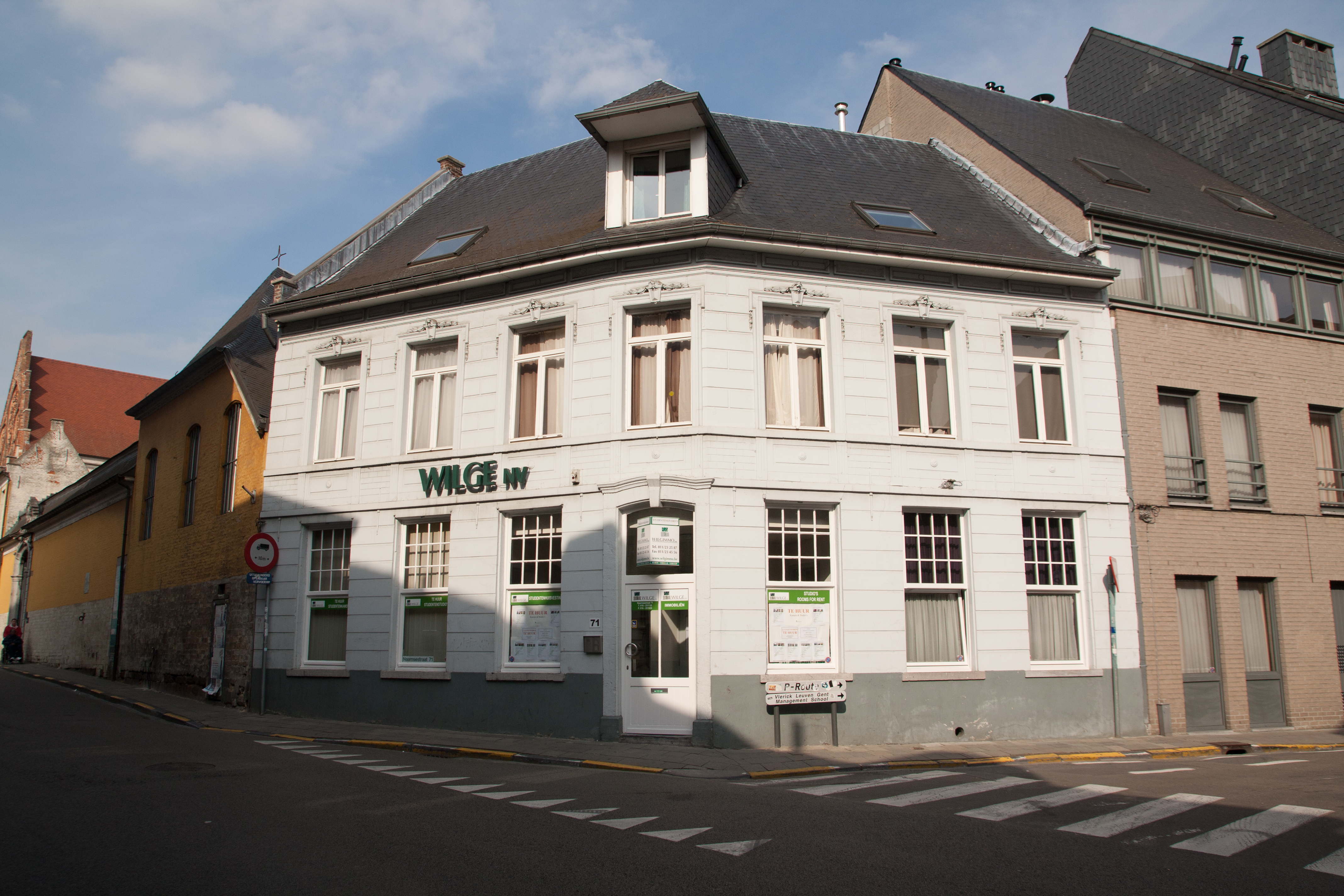 Naamsestraat 71 te Leuven, hoek met de Parkstraat